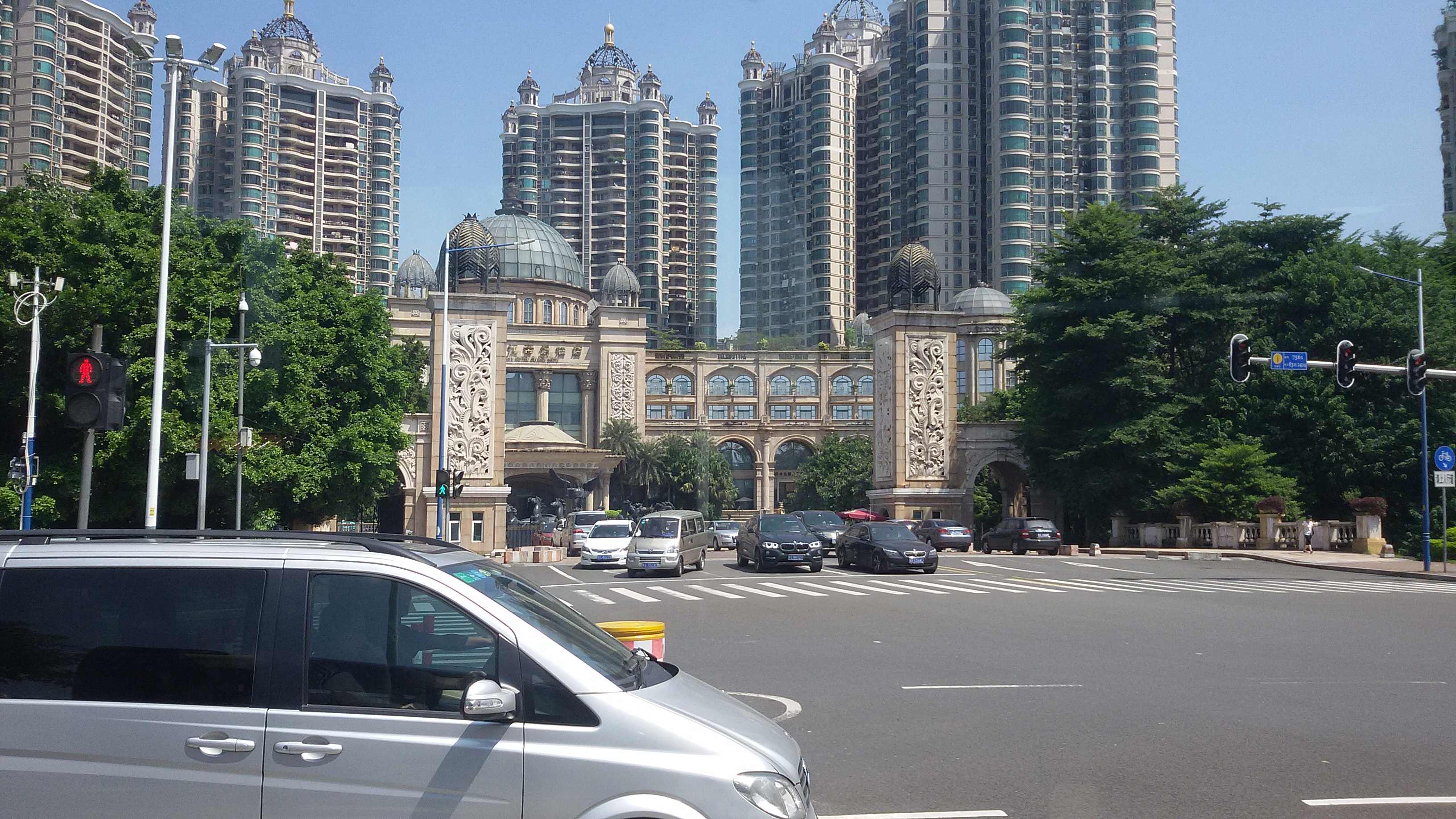 粵語: 珠江帝景苑